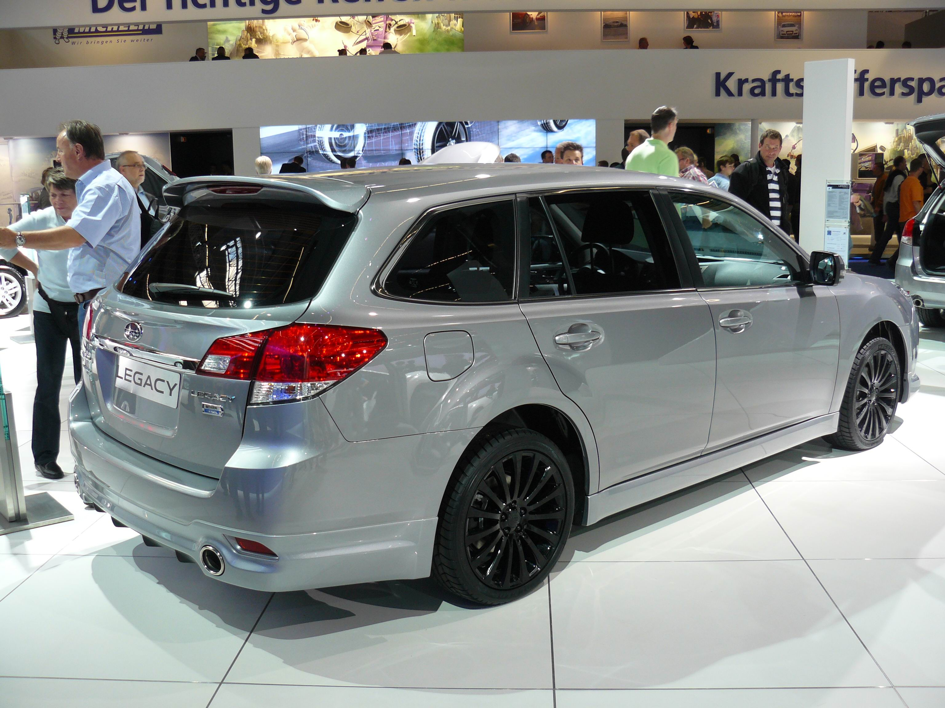 Francfort 2011